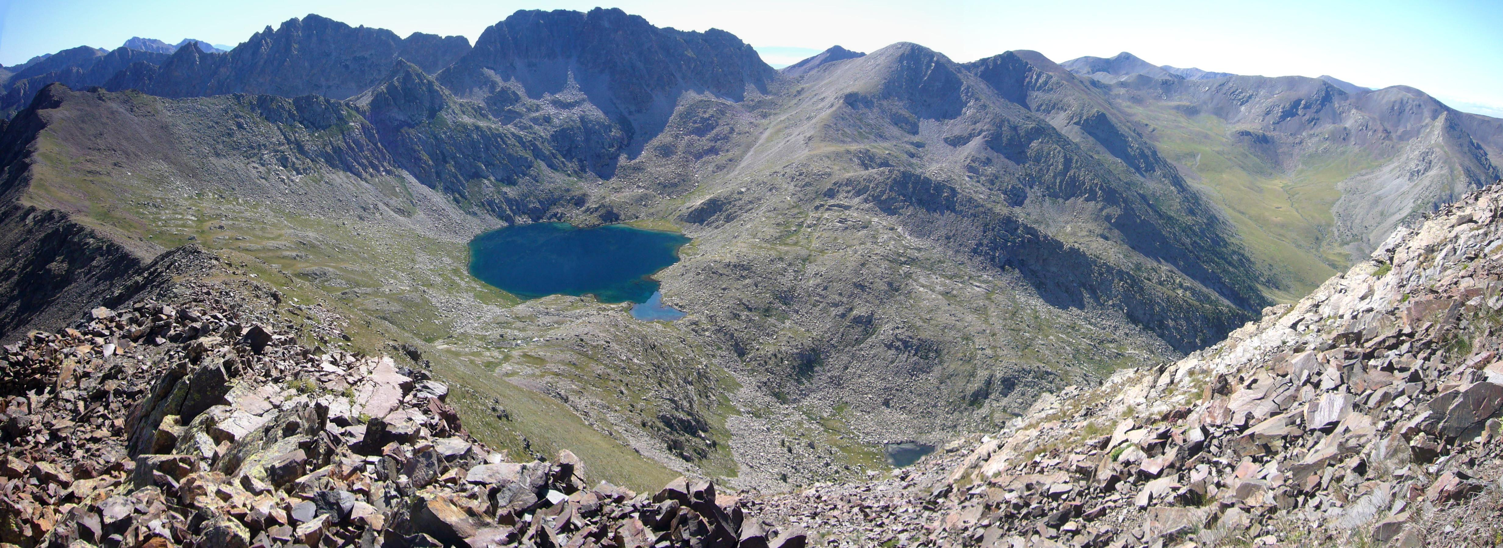 Coma del Pessó vista des del Tuc des Carants; la Vall de Boí, Alta Ribagorça, Catalunya